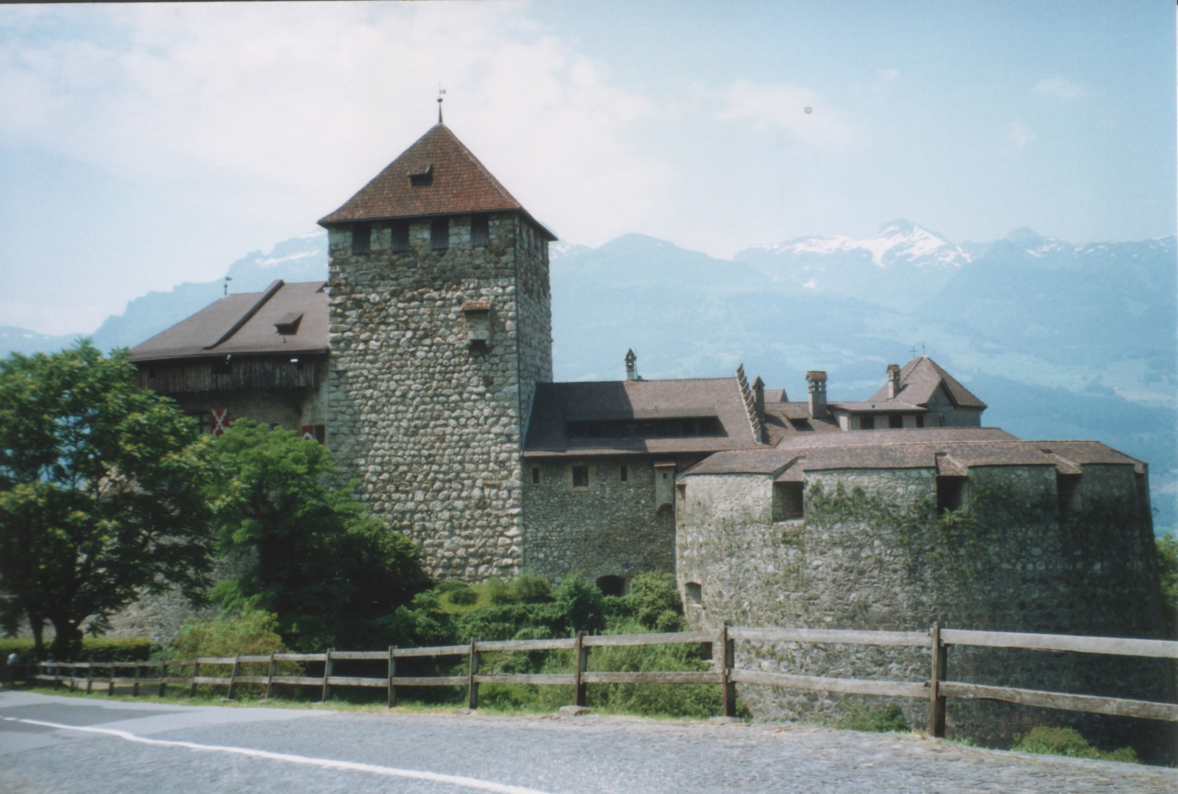 Vaduz, il Castello